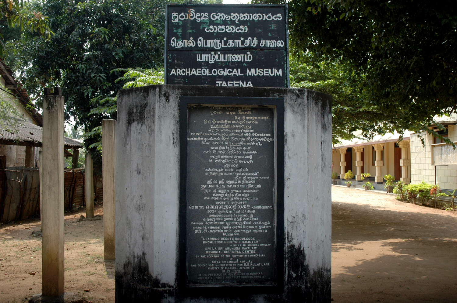 தொல் பொருட்காட்சிச்சாலை, யாழ்ப்பாணம்